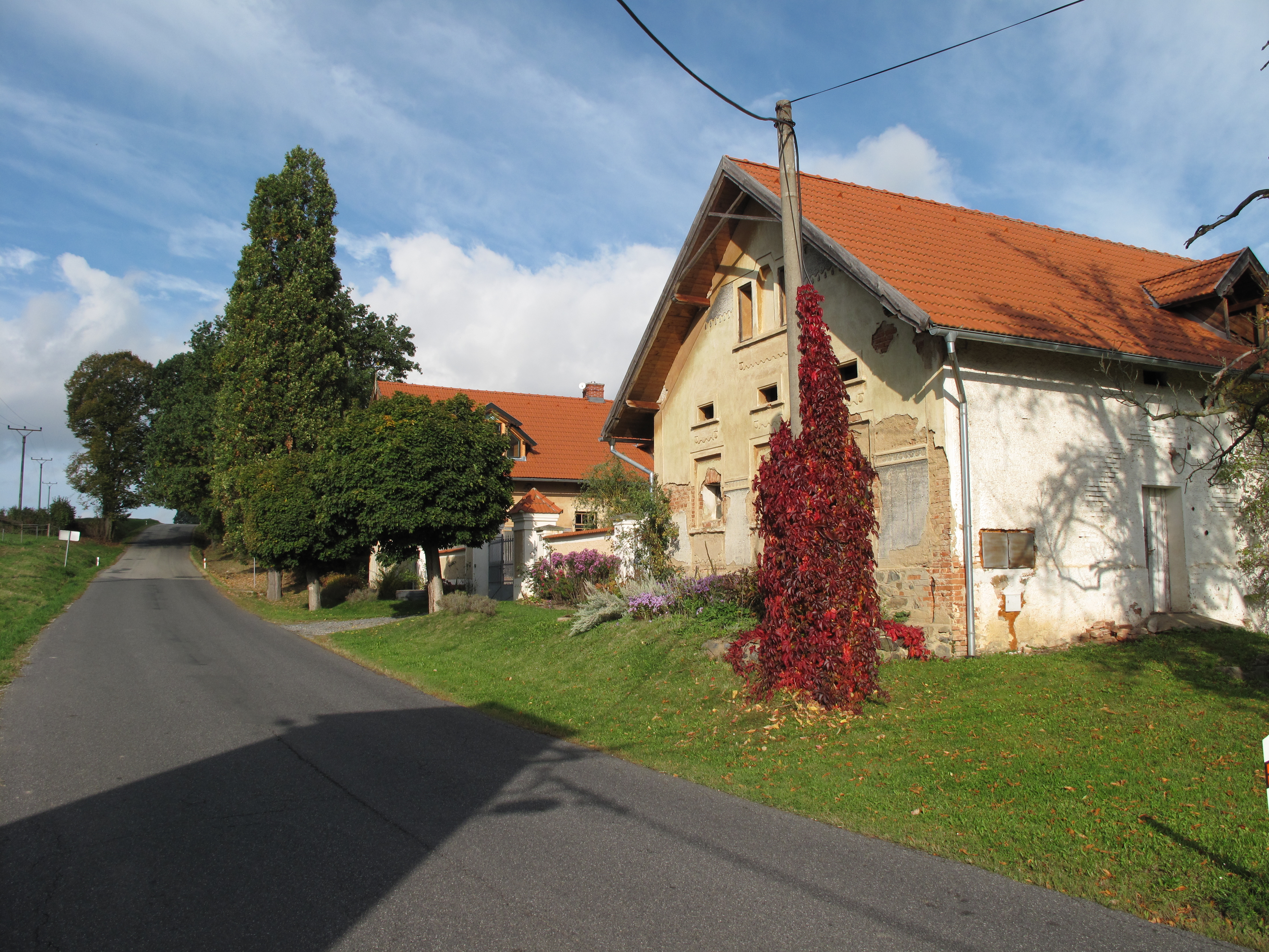 Slatina (Chudenice). Okres Klatovy, Česká republika.